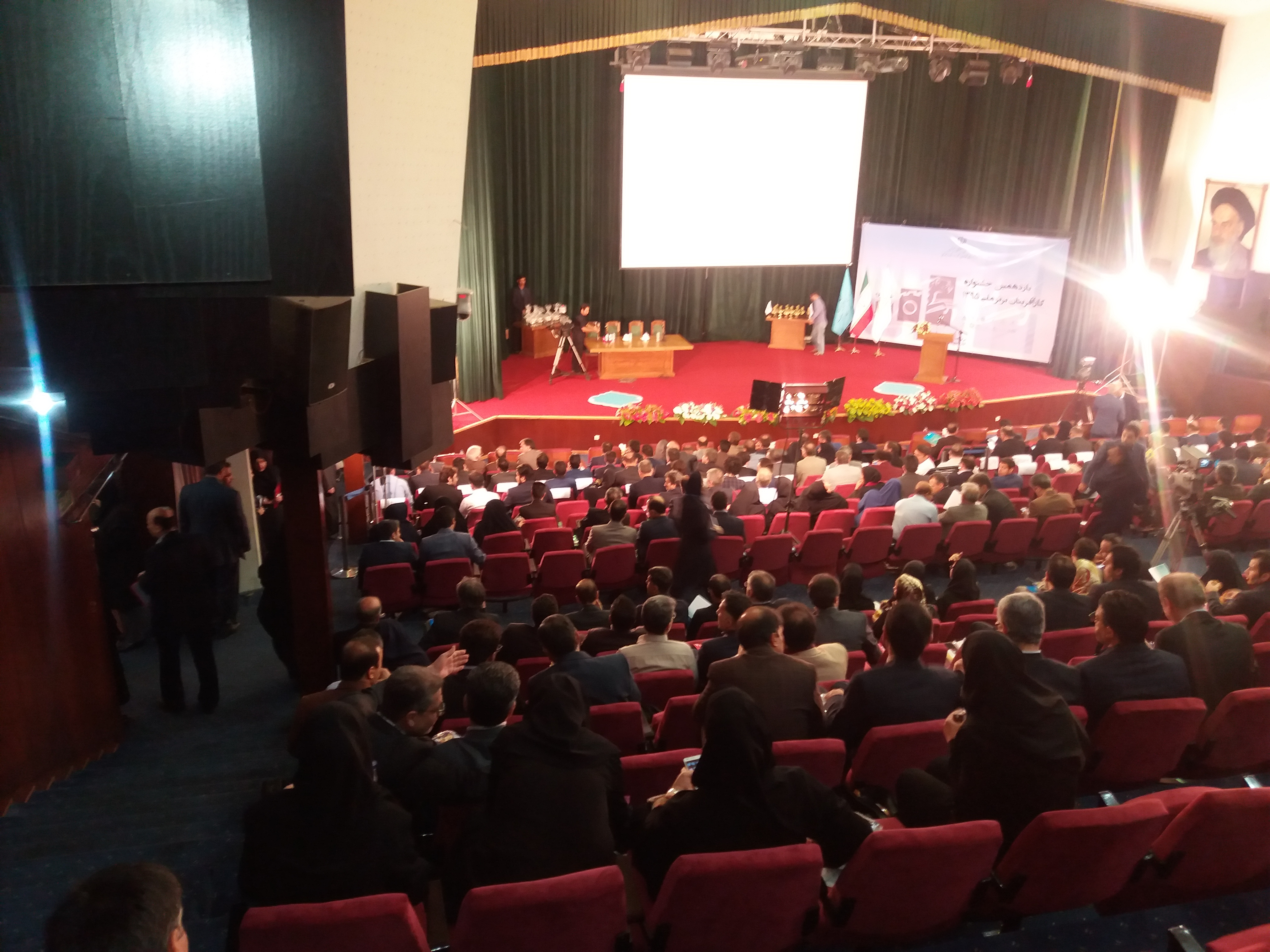 جشنواره کارآفرینان برتر کشور در سال 1396